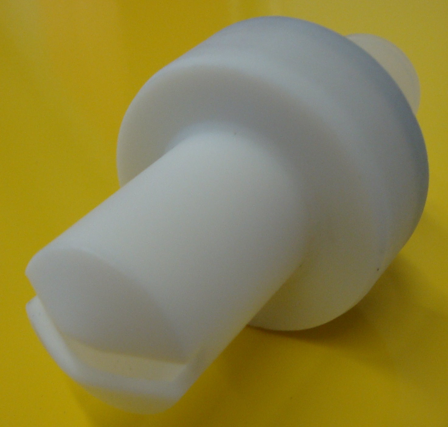 Flachstrahldüse für die Pulverbeschichtung